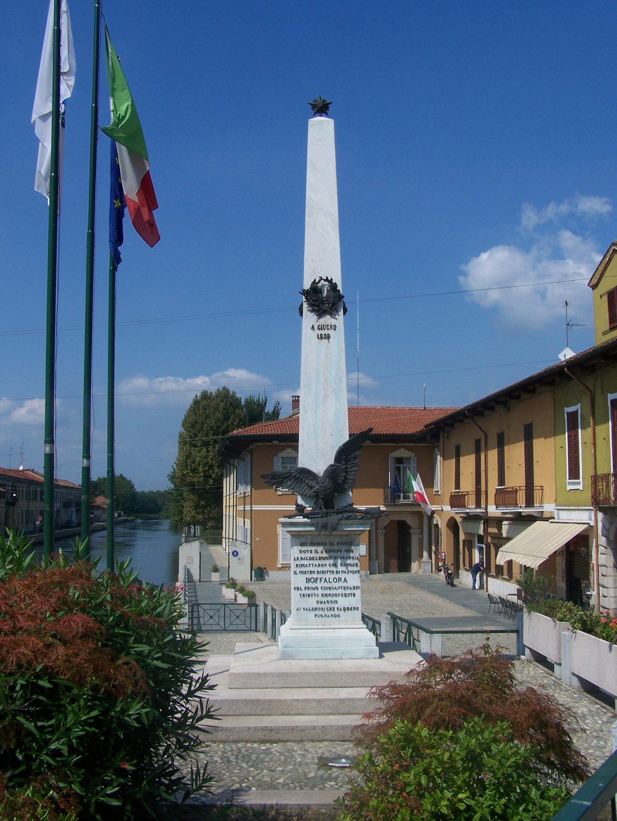 Monumento ai caduti della Battaglia di Magenta a Boffalora sopra Ticino (MI) - Italy